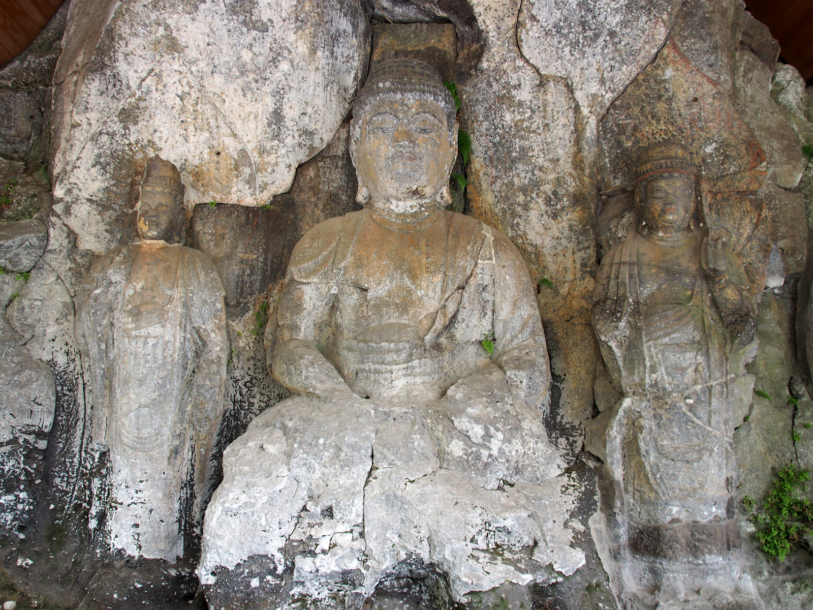 臼杵磨崖仏ホキ石仏第二群第一龕（大分県臼杵市）